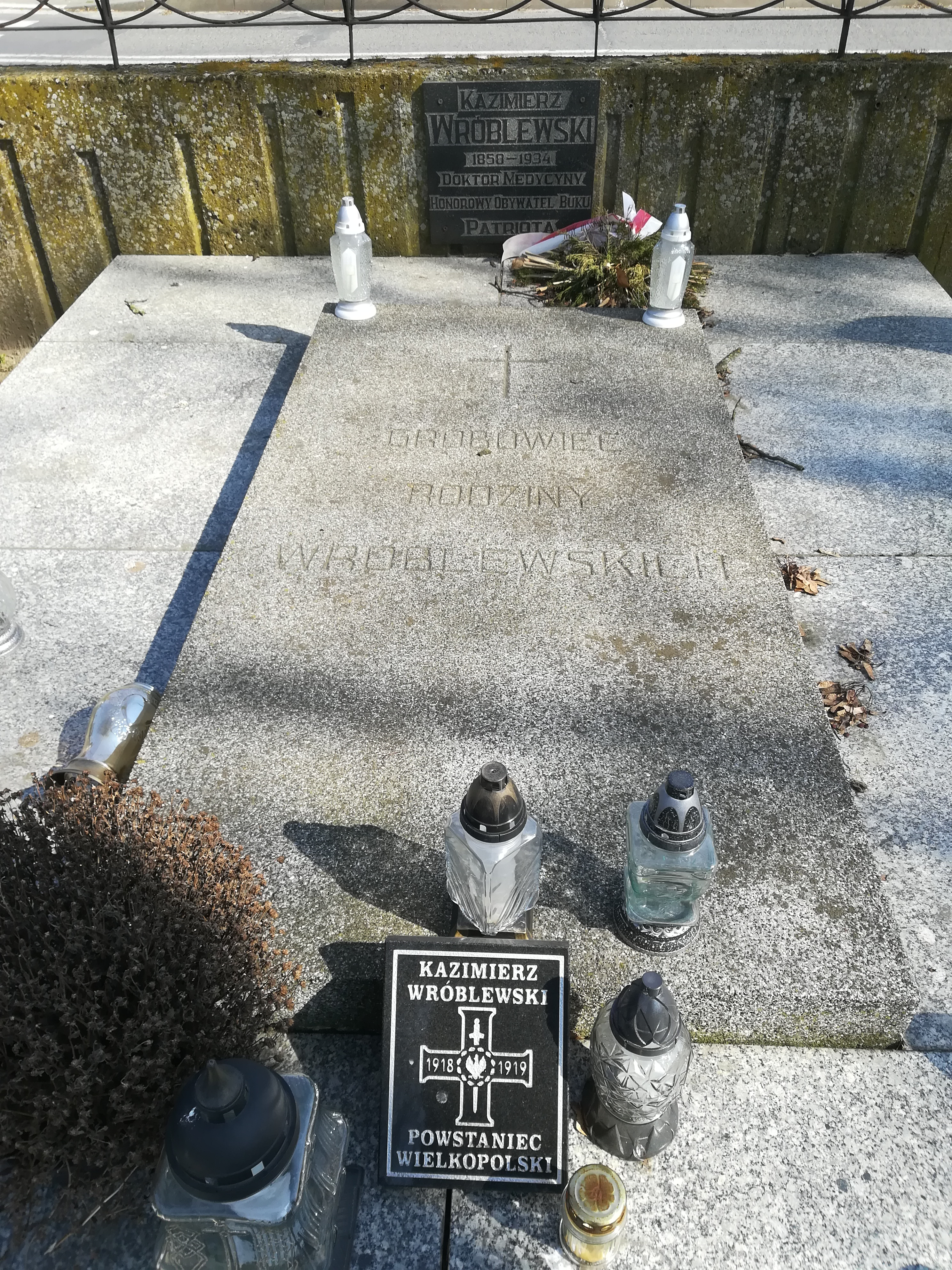 Grób powstańca wielkopolskiego na cmentarzu św. Rocha w Buku.